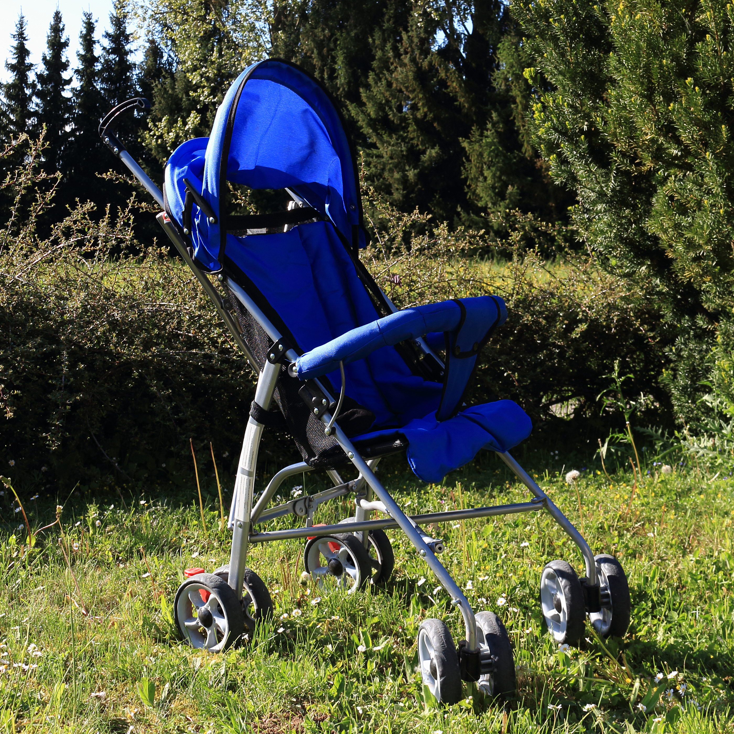 Kinderbuggy